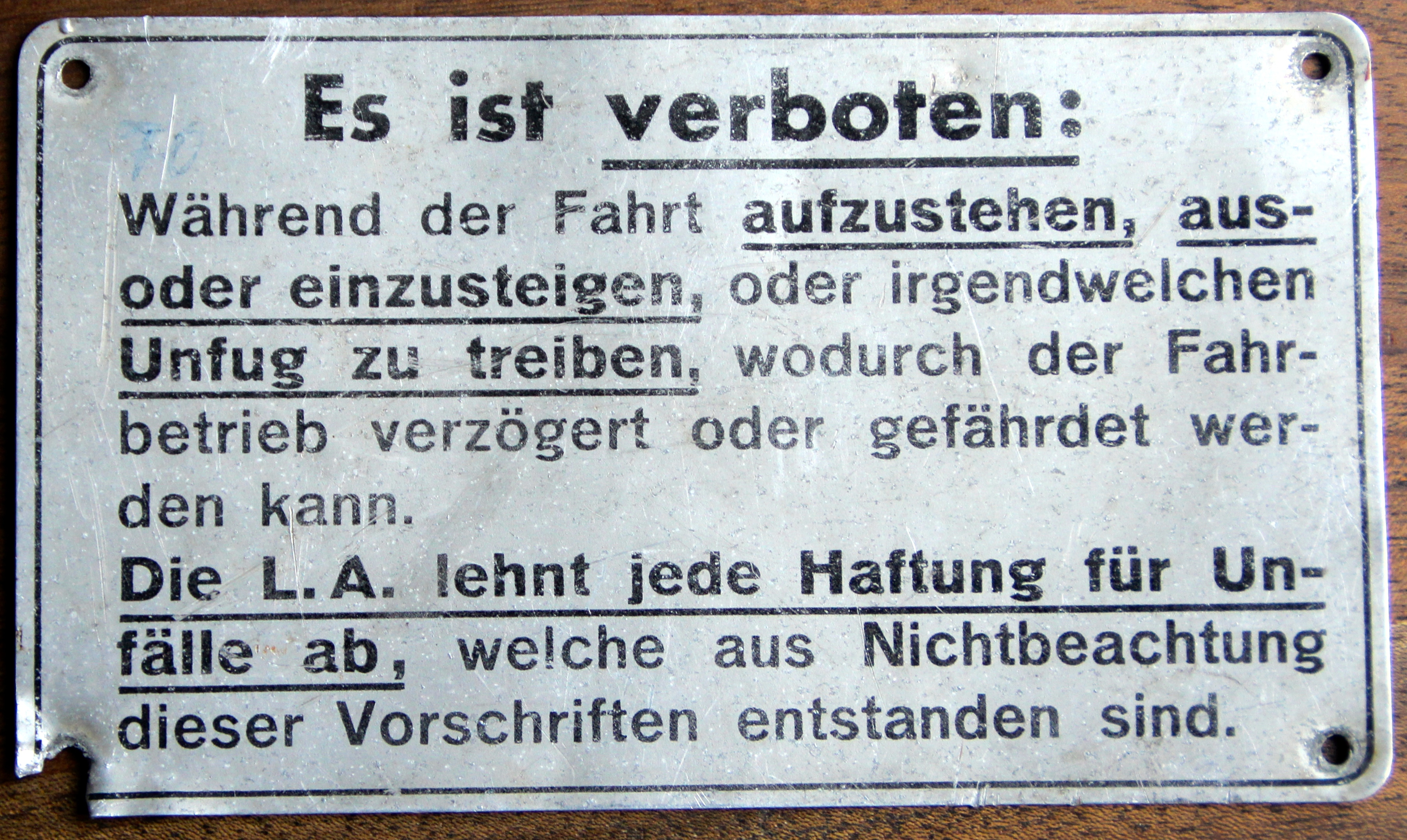 Schweizerische Landesausstellung 1939: Täfelchen von einem Boot des Schifflibachs, 12x7 cm